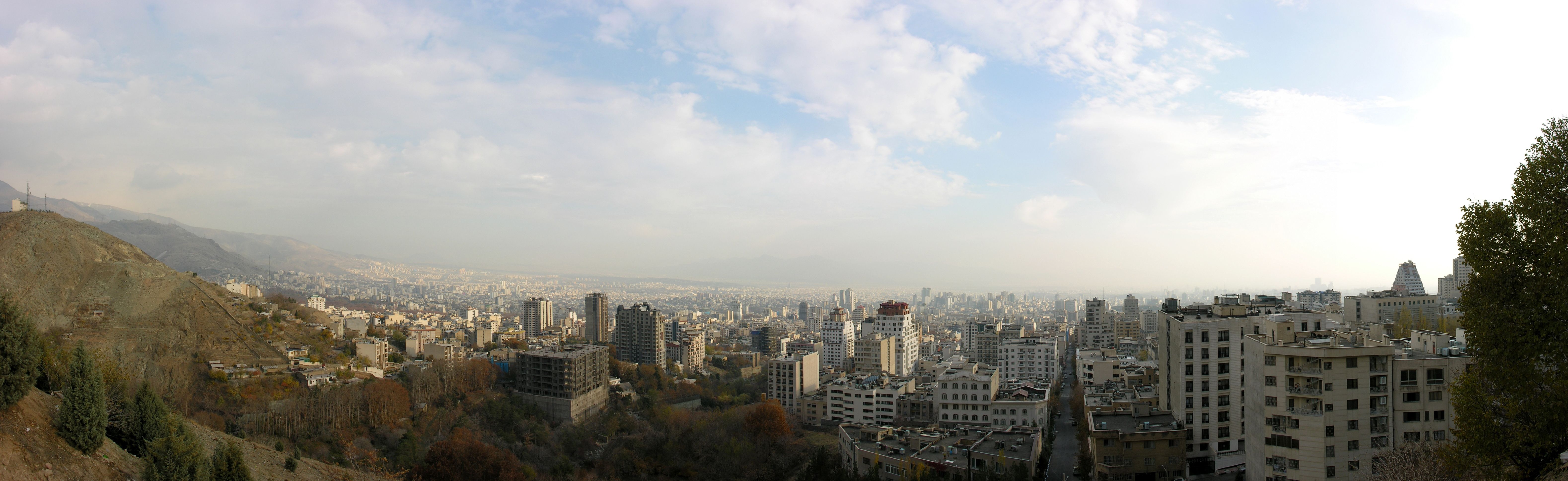 Iran, Teheran Velenjak